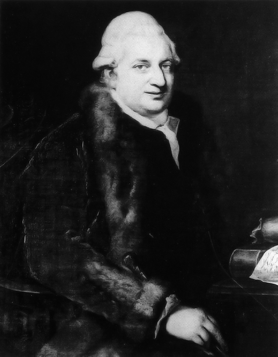 Porträt Conrad von der Leyens (1730-1797)